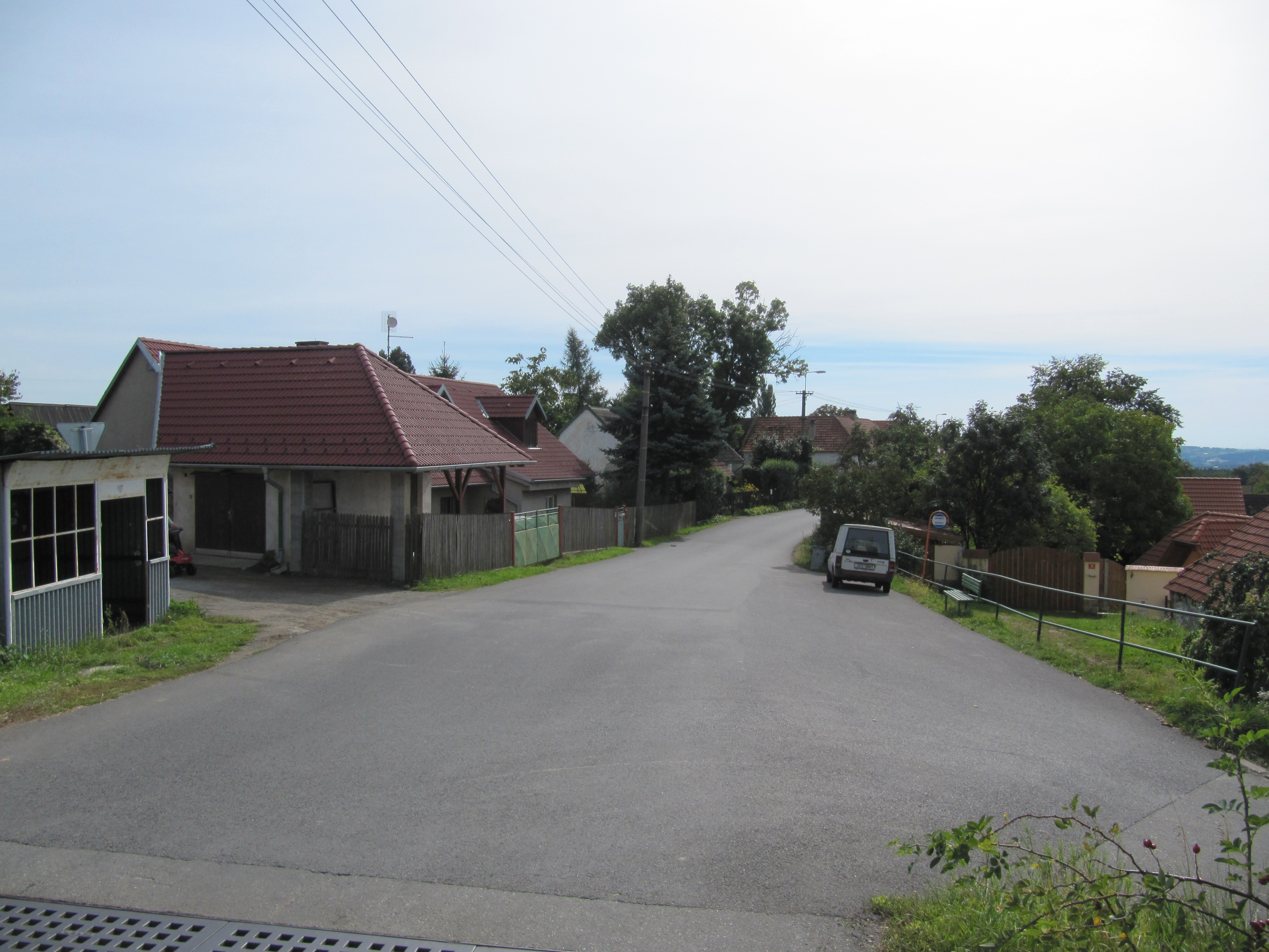 Červené Záhoří